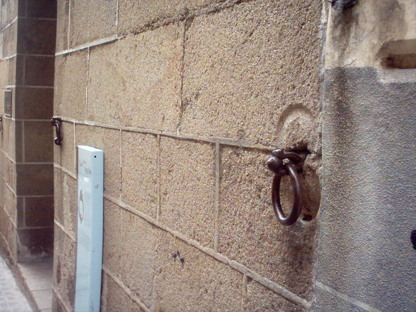 Argollas